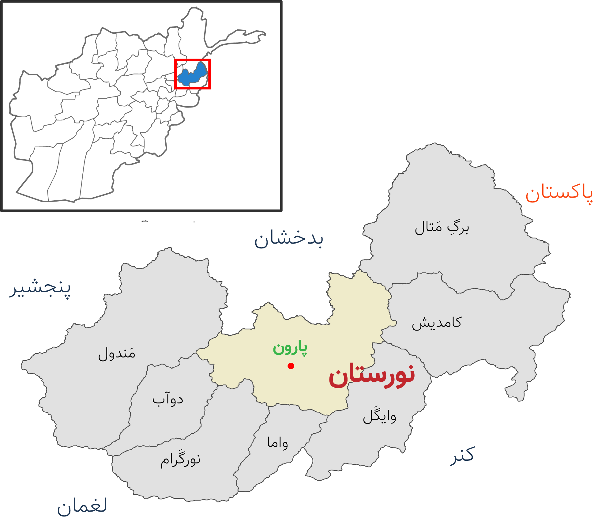 نقشه ولایت نورستان